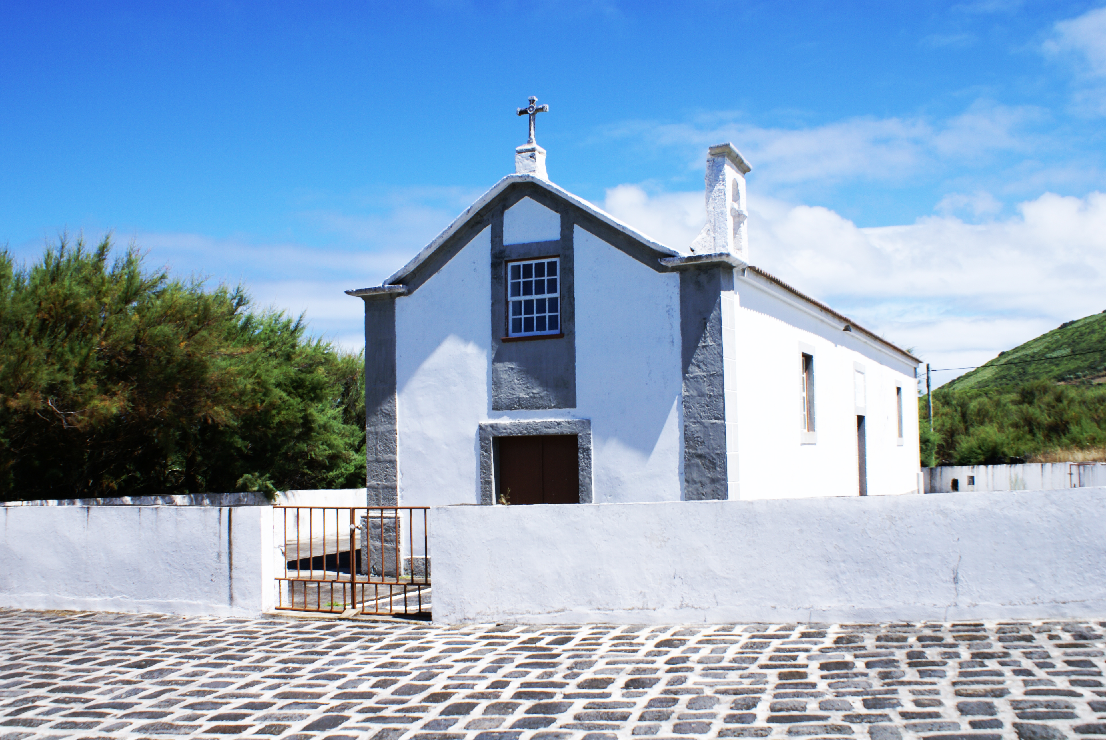 Ermida de Nossa Senhora das Vitórias, Fachada, Vitória, Santa Cruz da Graciosa, ilha Graciosa, Açores, Portugal